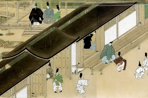 春日権現験記絵』に描かれた中門廊